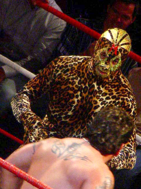 Mil Mascaras